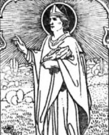 Alphege